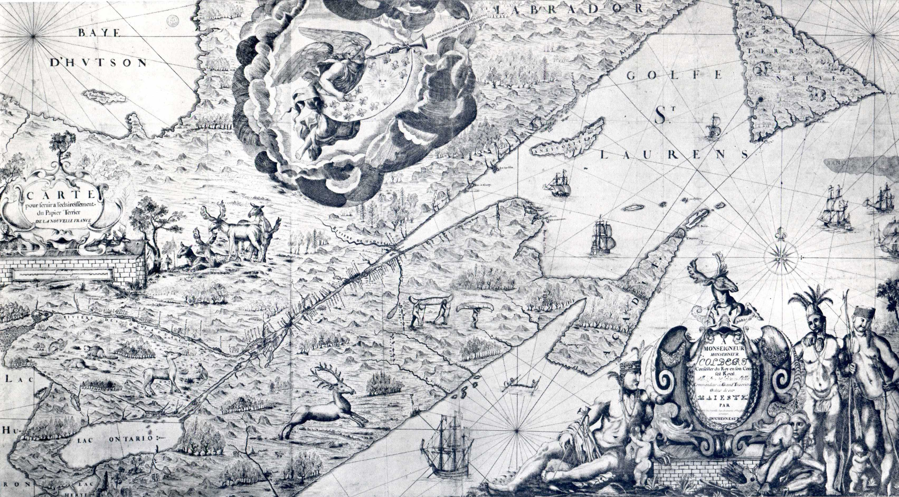 Carte de la Nouvelle-France dédiée au Ministre Colbert par l'intendant du Canada M. Duchesneau (dernier quart du XVIIe siècle).